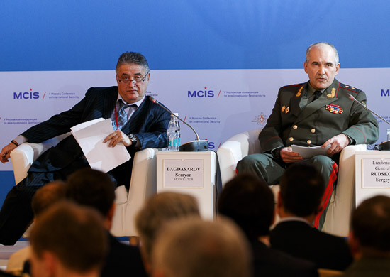 Семён Багдасаров и начальника Главного оперативного управления Генерального штаба Вооруженных Сил РФ генерал-лейтенант Сергей Рудской во время дискуссионной сессии V Московской конференции по международной безопасности.